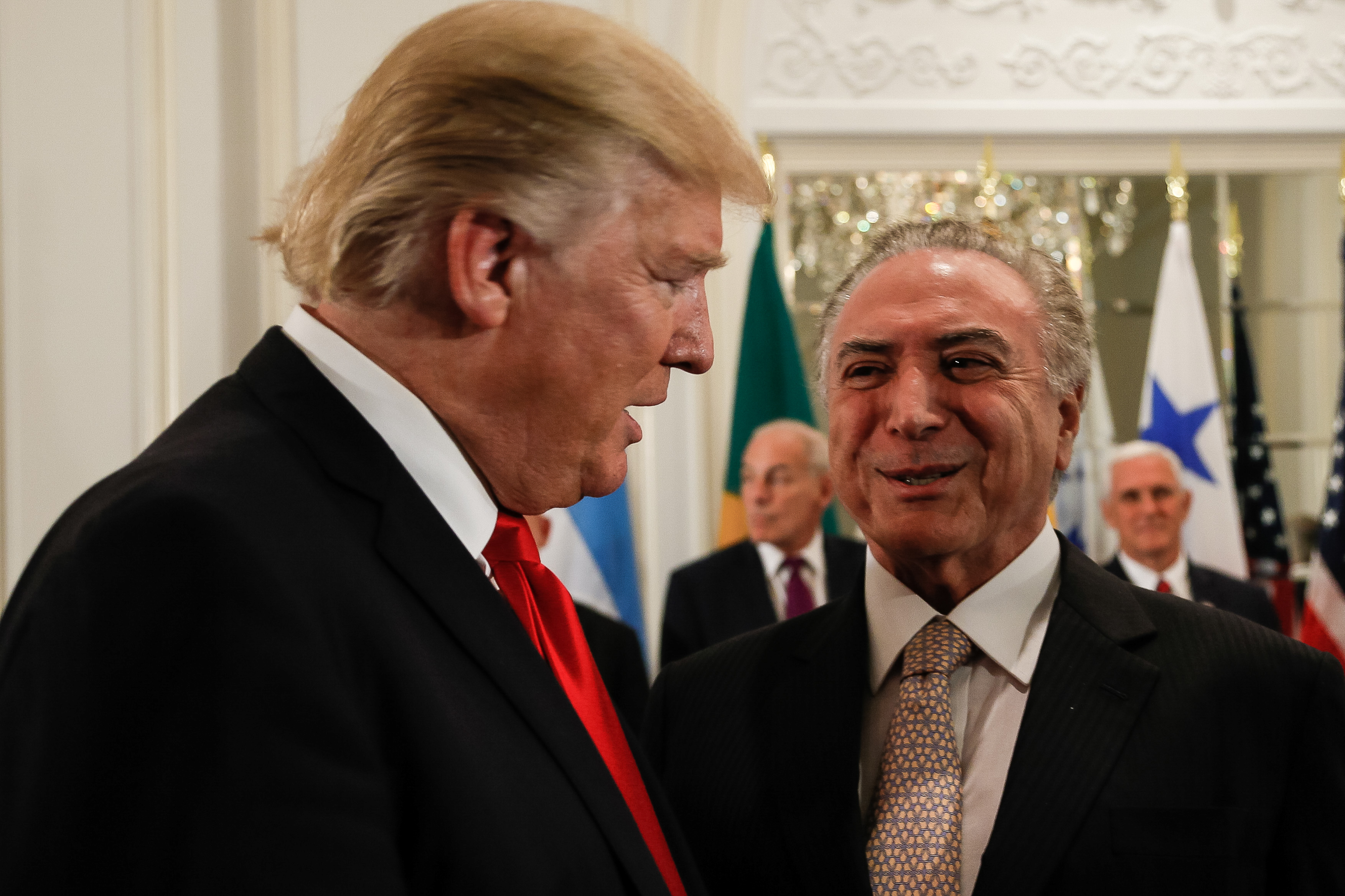 (Nova York - Estados Unidos, 18/09/2017) Jantar de trabalho oferecido pelo presidente dos Estados Unidos da América, senhor Donald Trump. Foto: Beto Barata/PR